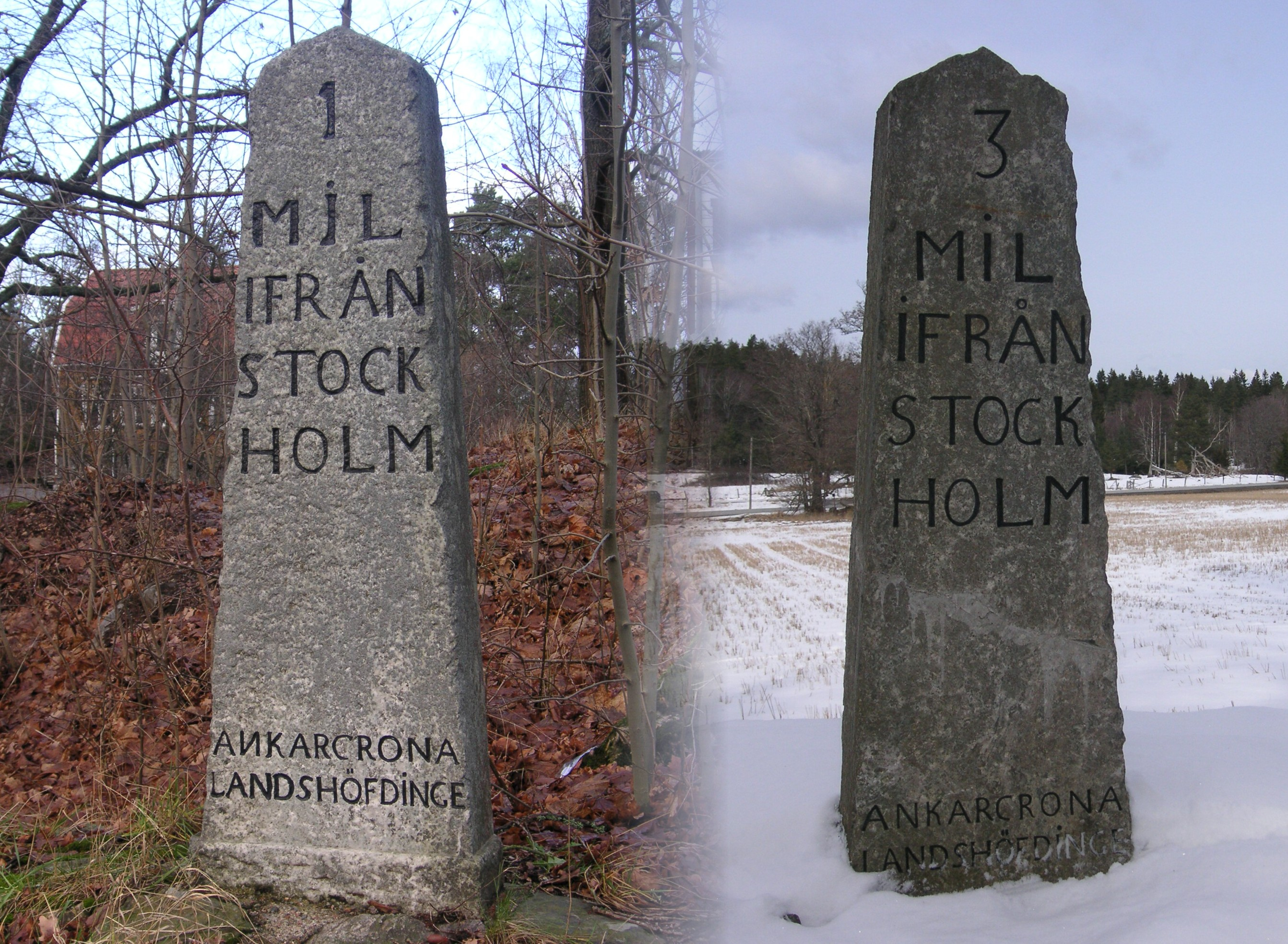 Milstenar, Meilensteine, milestones (Gamla Södertäljevägen, Sweden). Text: 1 (3) Meile(n) von Stockholm, Ankarcrona Landshövding